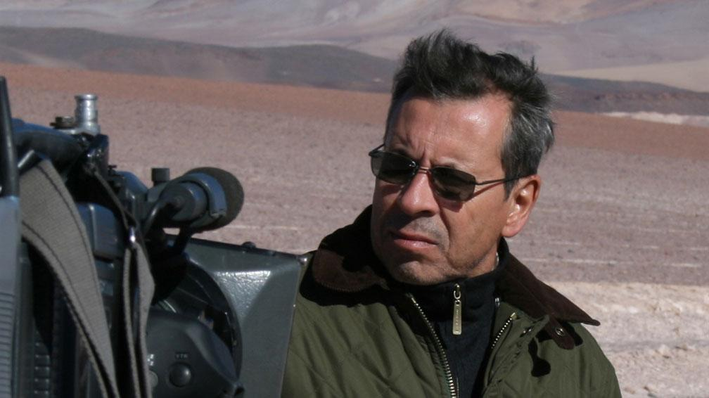 Mario Markic - En el Camino